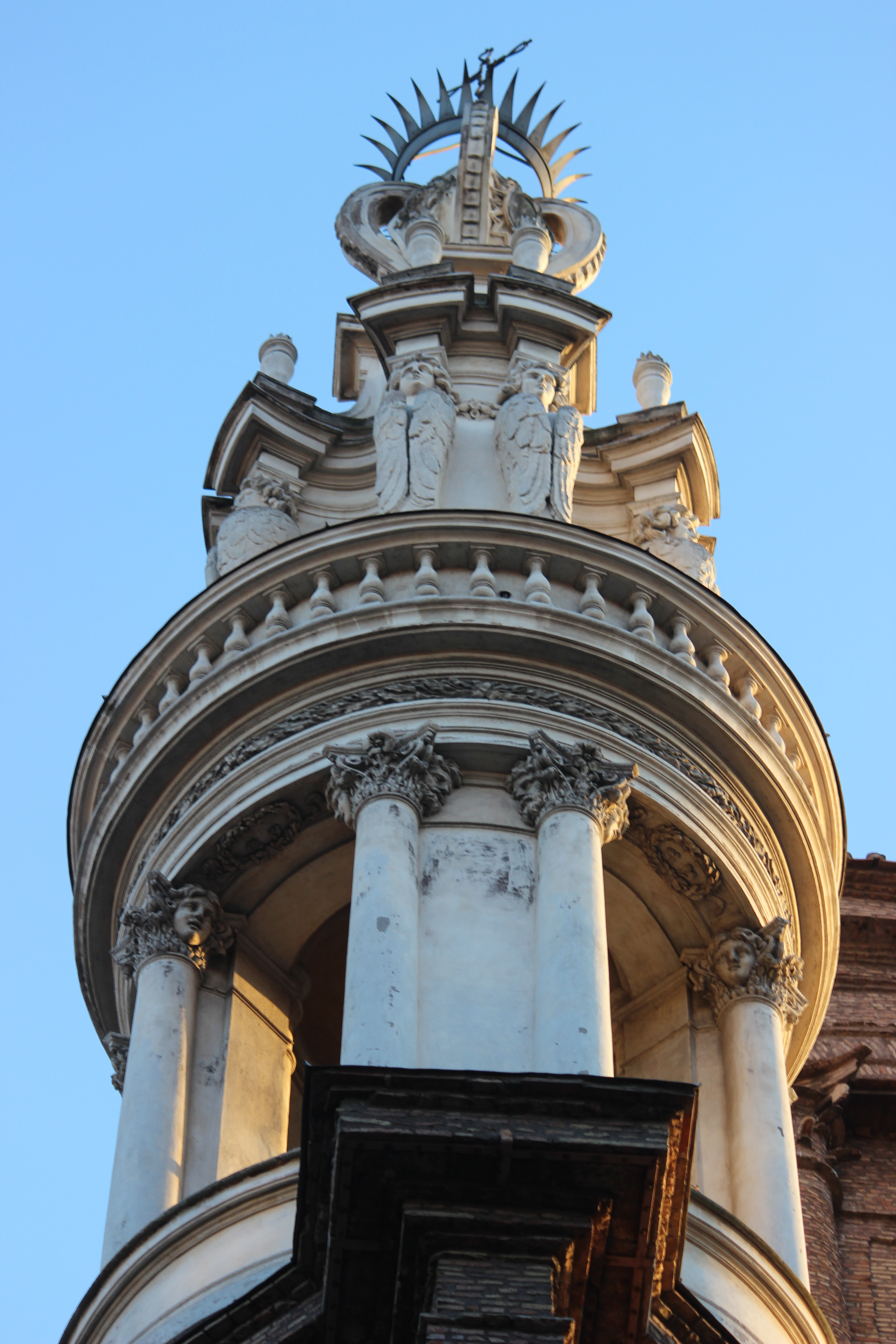 Roma. Sant'Andrea delle Fratte. Campanario de Francesco Borromini.